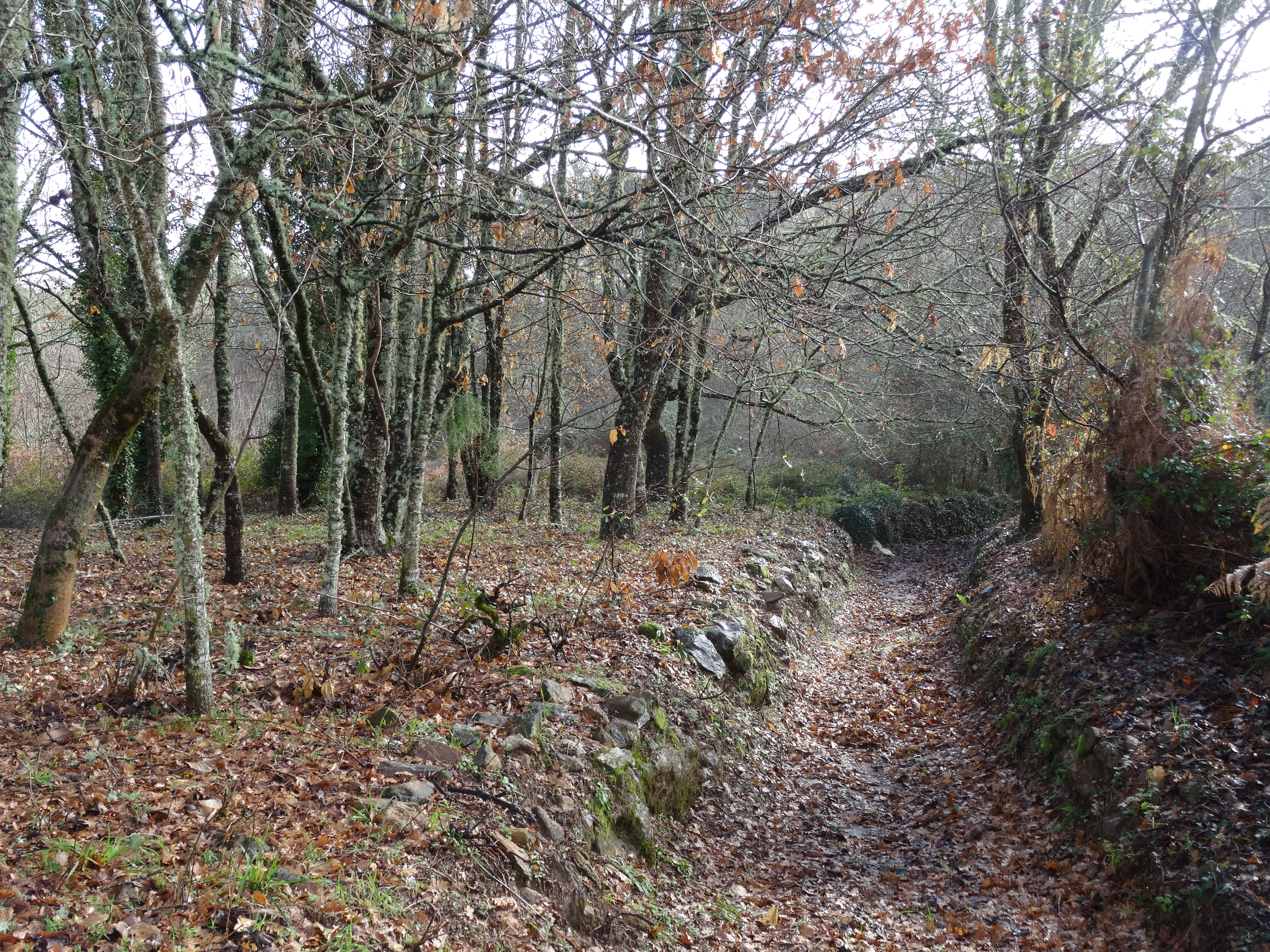 Ver título.